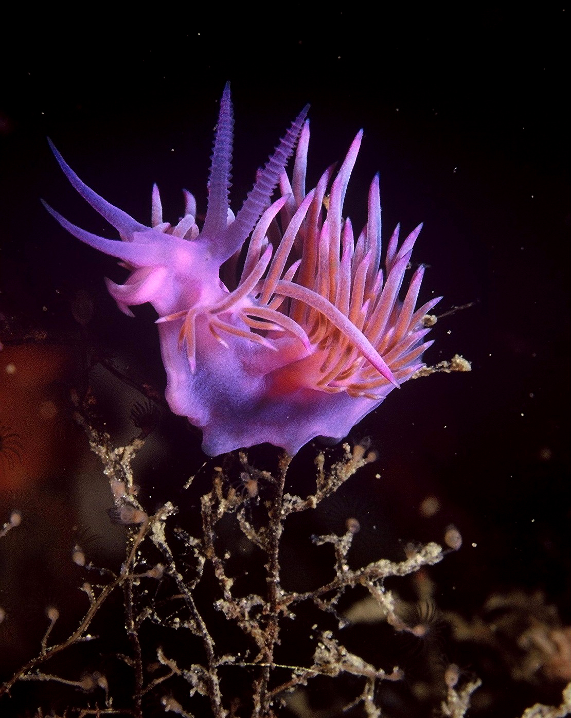 .Flabellina affinis (Gmelin, 1791) - Banyuls-sur-Mer